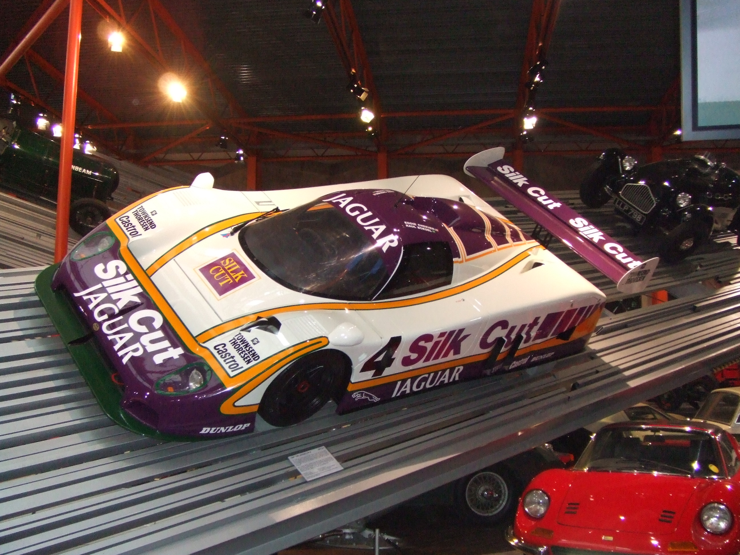 Jaguar XJR Le Mans at the Beaulieu Motor Museum,10/06.